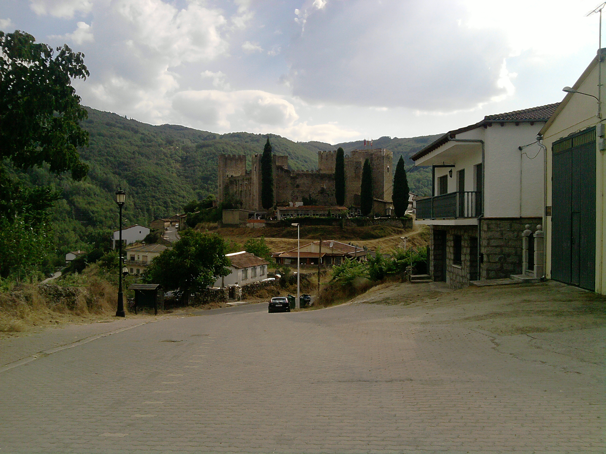 Esta es una foto del castillo que hay en el pueblo.